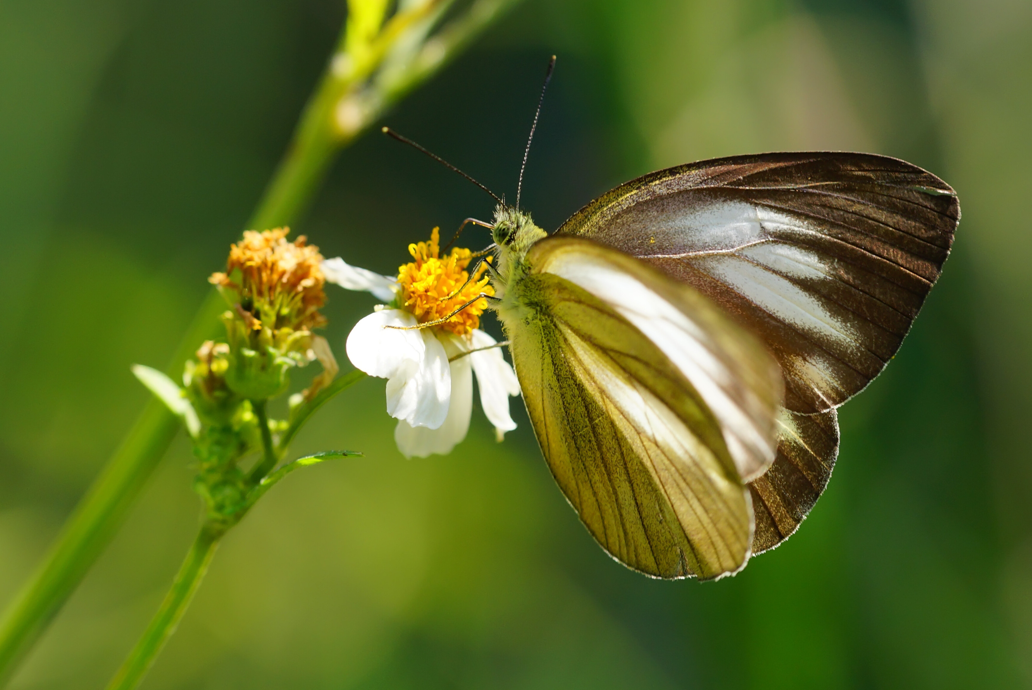 淡褐脈粉蝶 Cepora nadina eunama